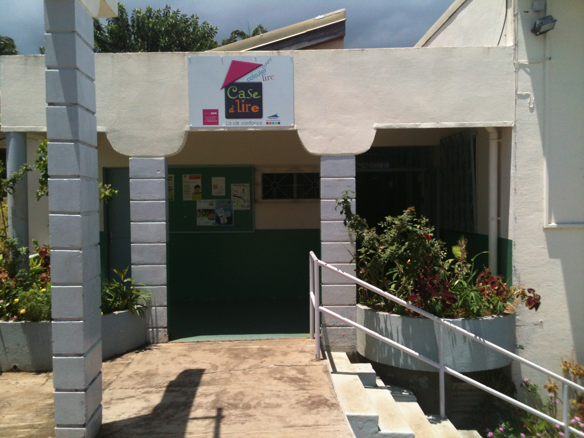 Site du Moufia